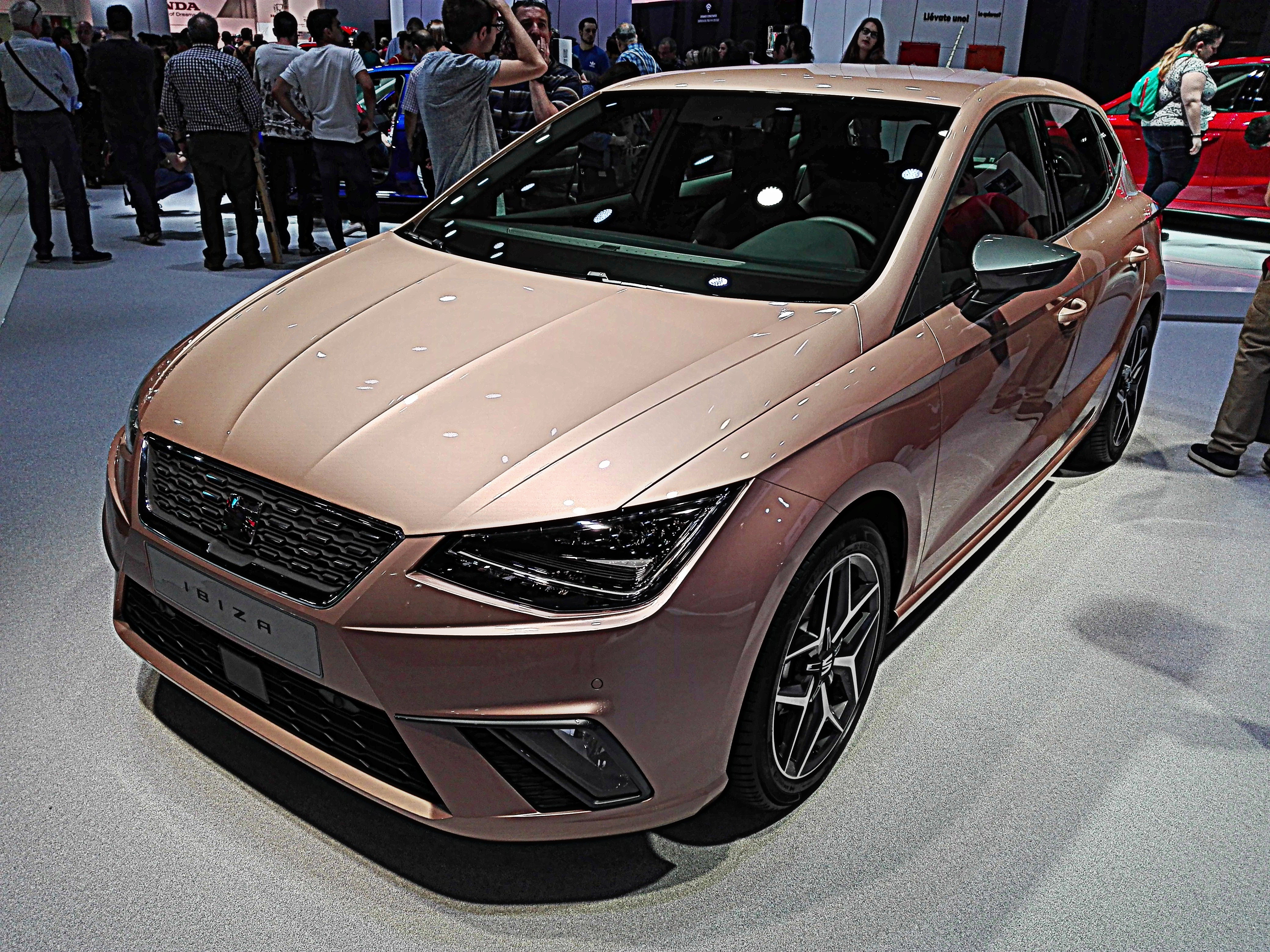 SEAT Ibiza V 2017 Xcellence Magenta Mystic